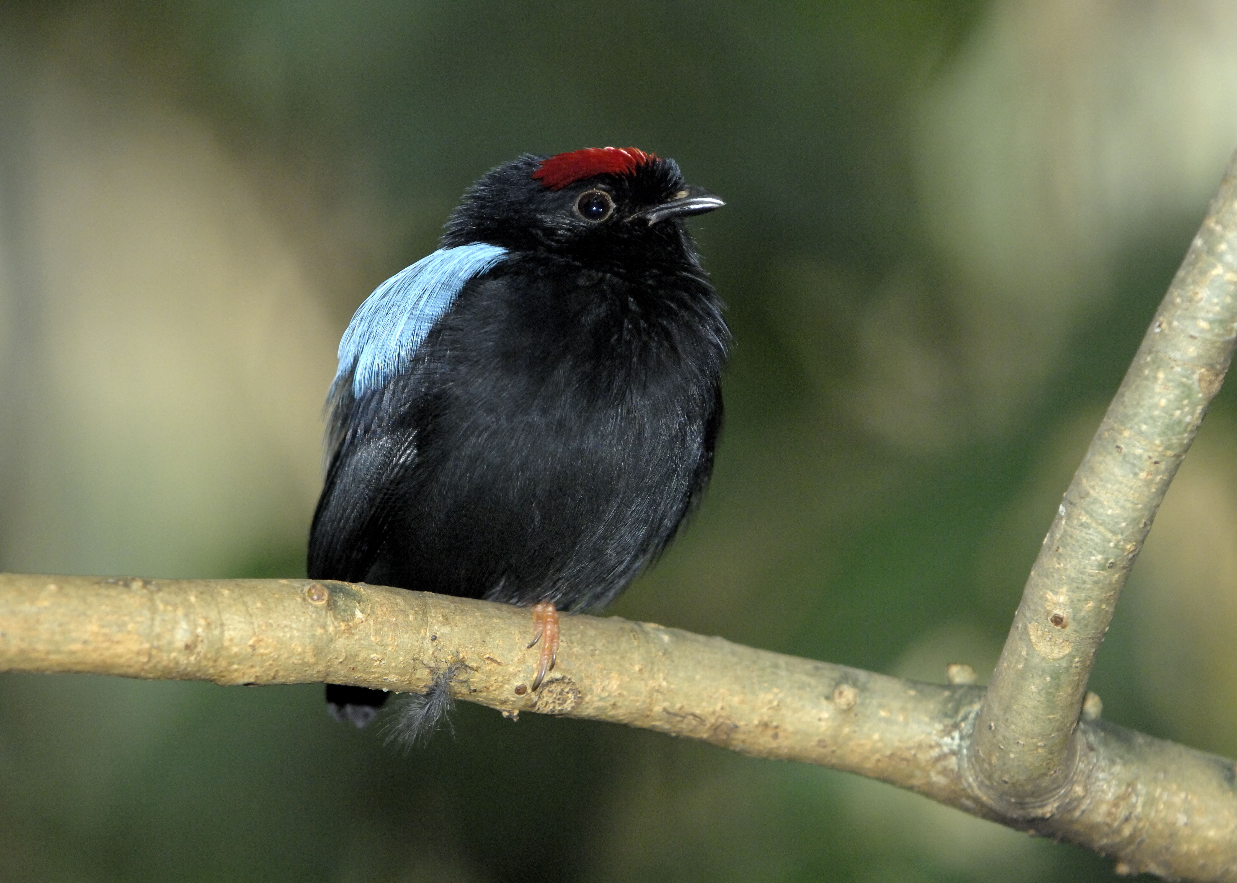 Prachtpipra (Chiroxiphia pareola) im Tiergarten Schönbrunn, Wien, Österreich